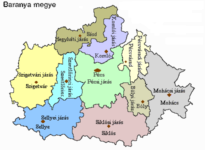 Magyarország, Baranya megyeijárások